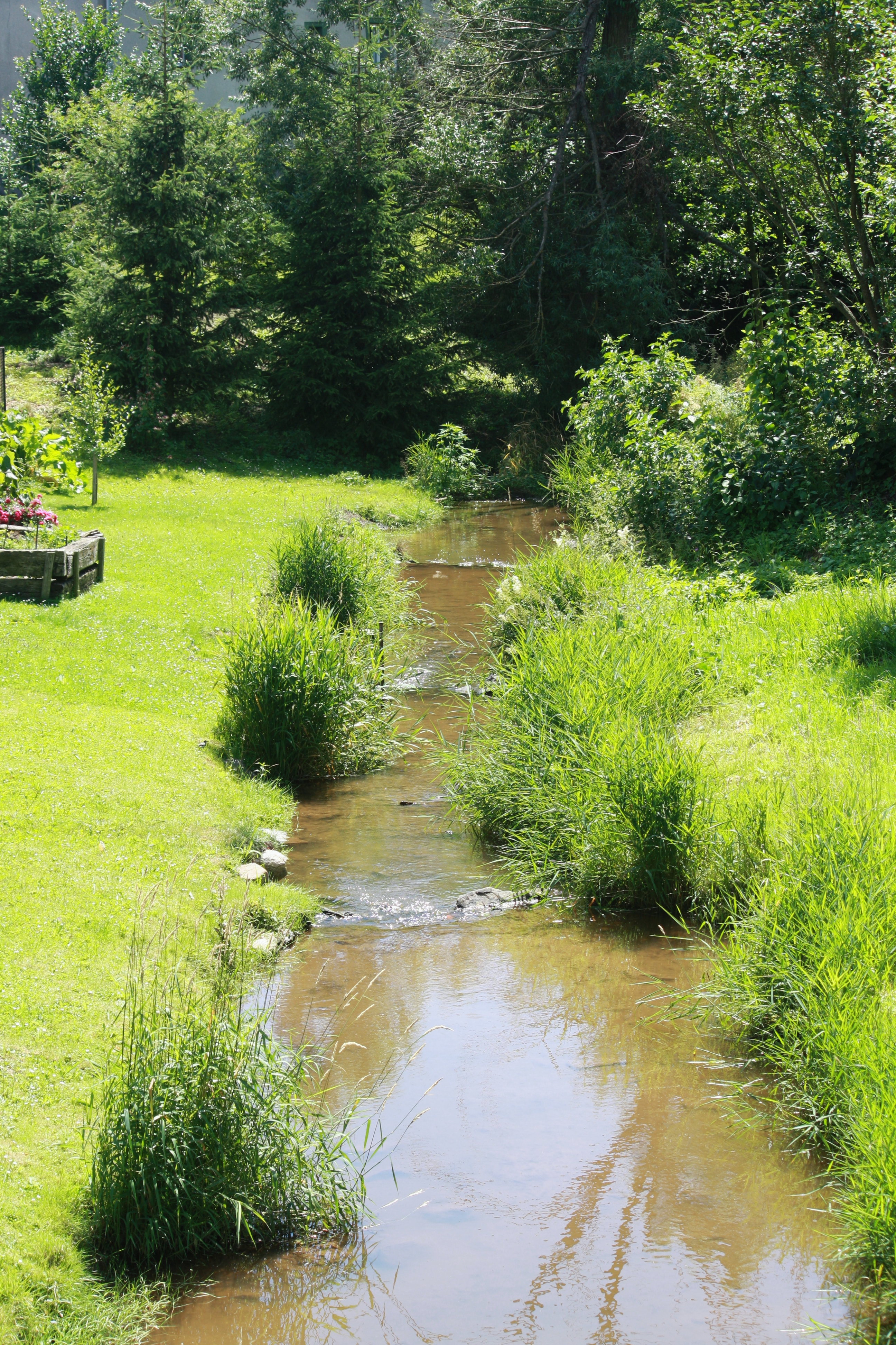 Přehořov - Mladotický potok